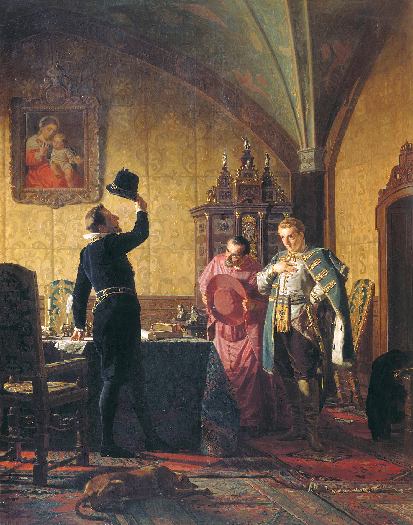 False Dymitry I swearing Sigismund III of Poland introduction of catholicism in Russia Присяга Лжедмитрия I польскому королю Сигизмунду III на введение в России католицизма